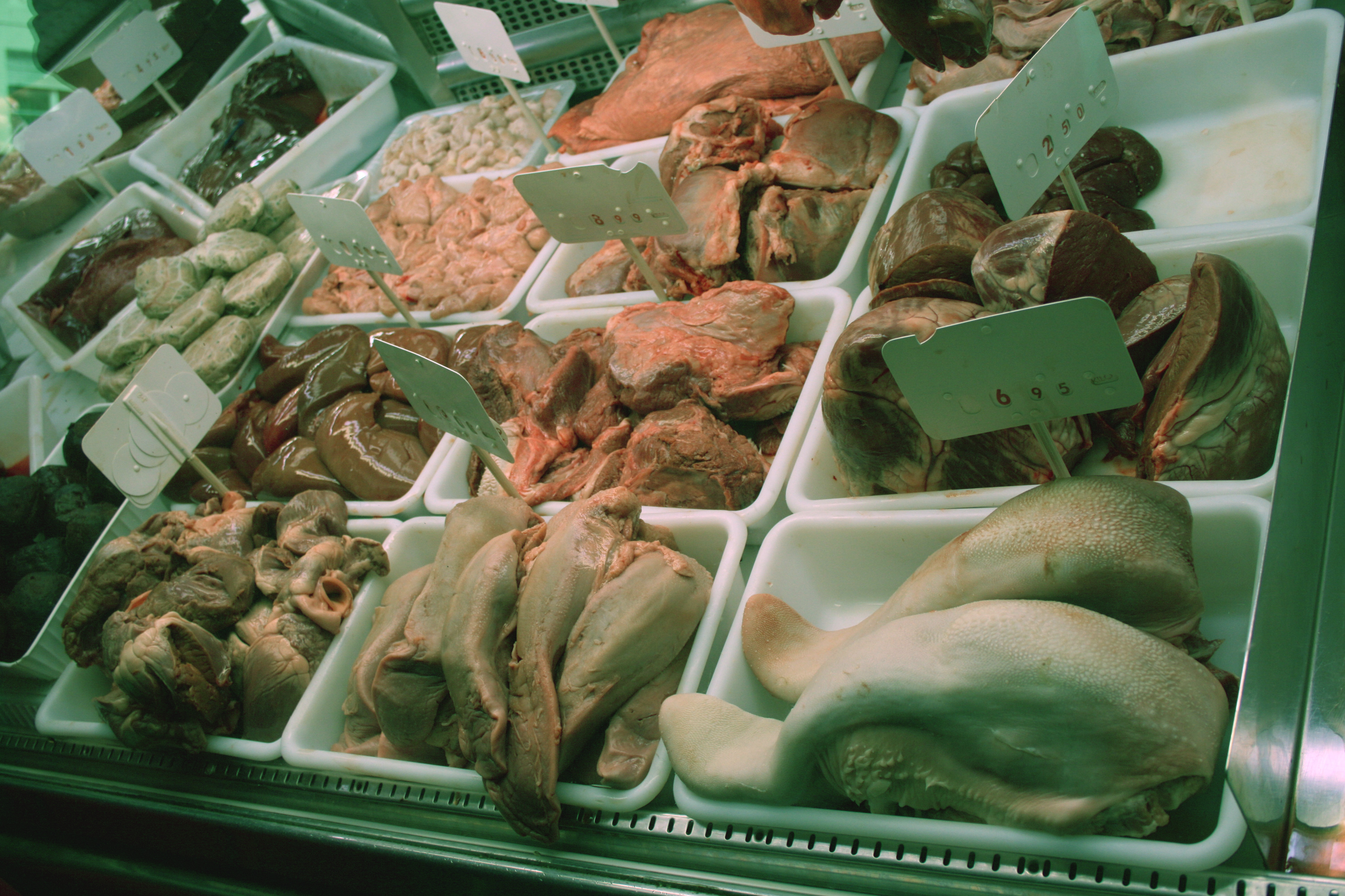 Despojos diversos de vaca